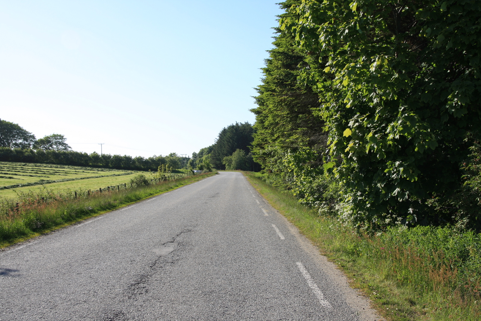 Fylkesvei 260 mot Postveien